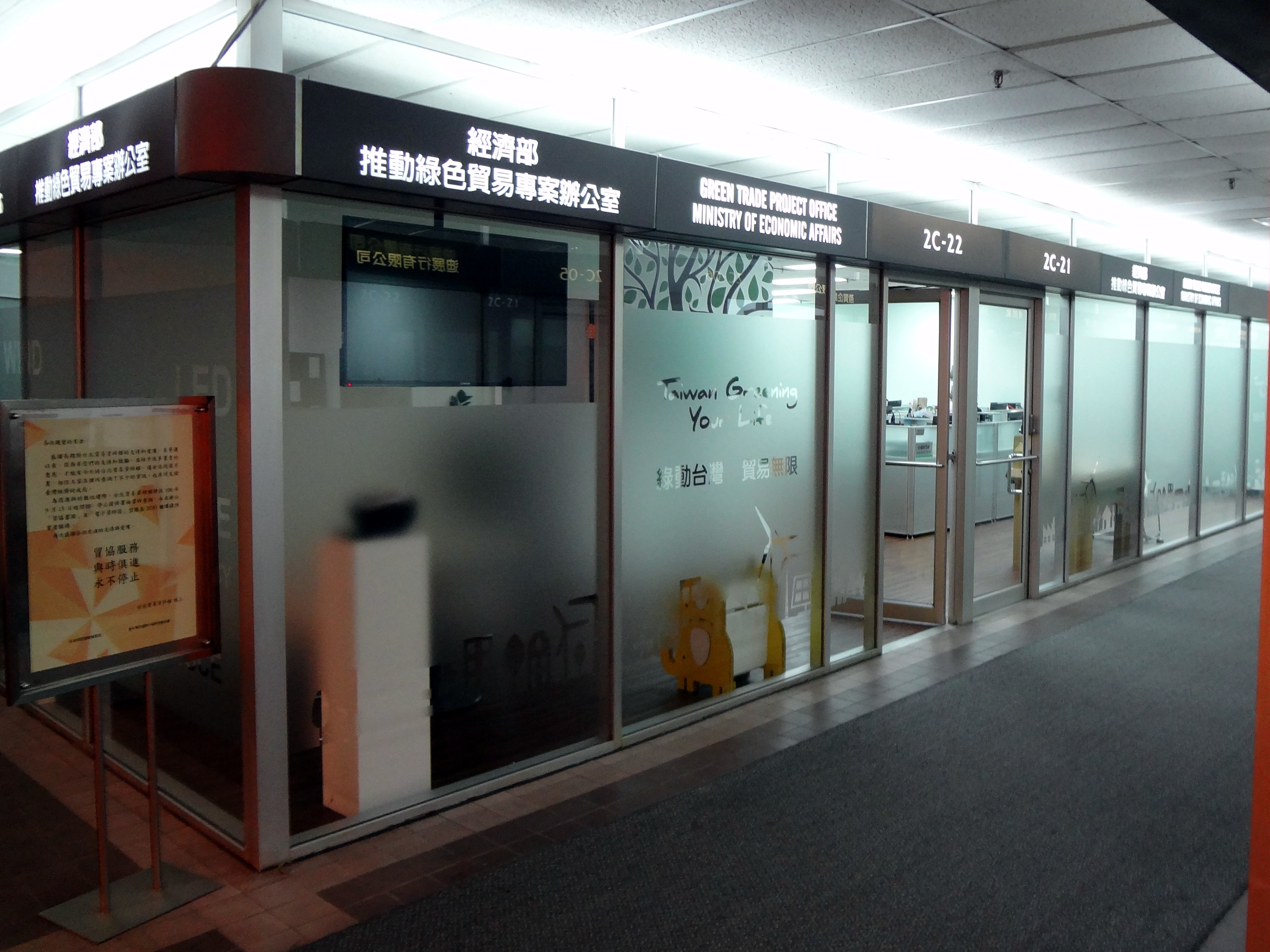 台北世界貿易中心展覽大樓2樓，中華民國經濟部推動綠色貿易專案辦公室。